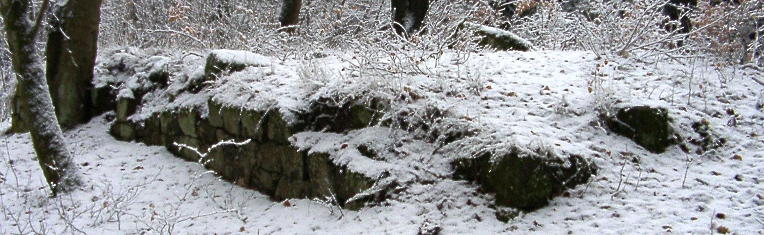 Schloss Schaudichnichtum: Ruine des Jagdhaus Schudichnichtum